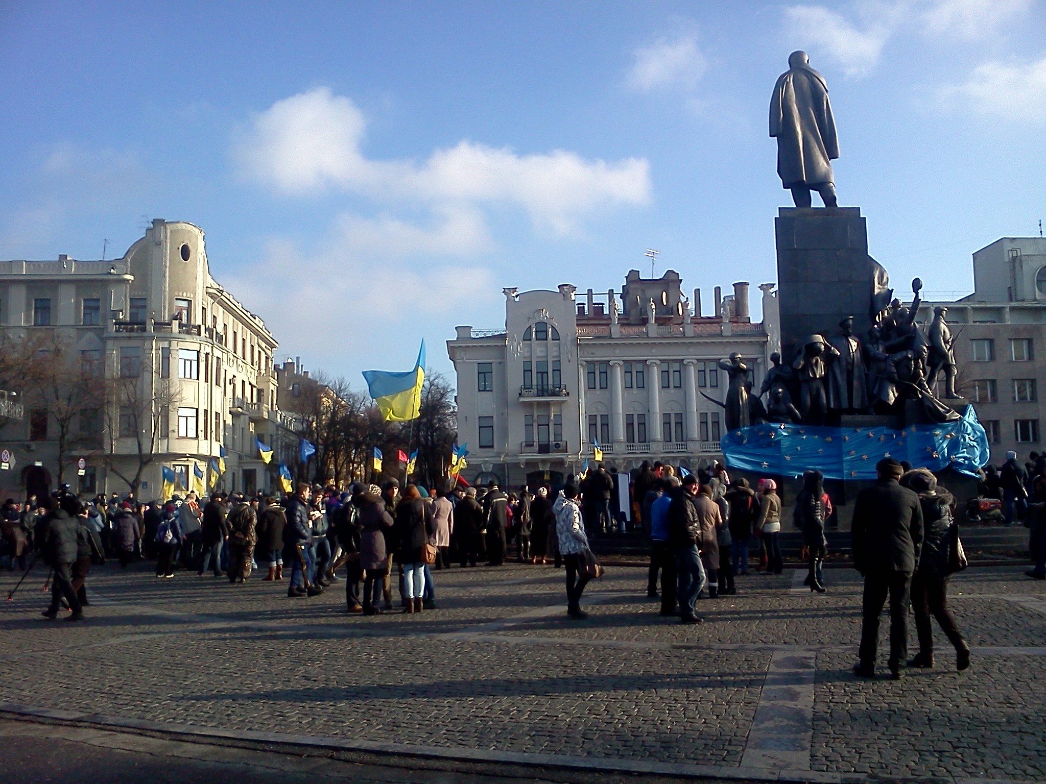 Друга неділя Євромайданів у Харкові.